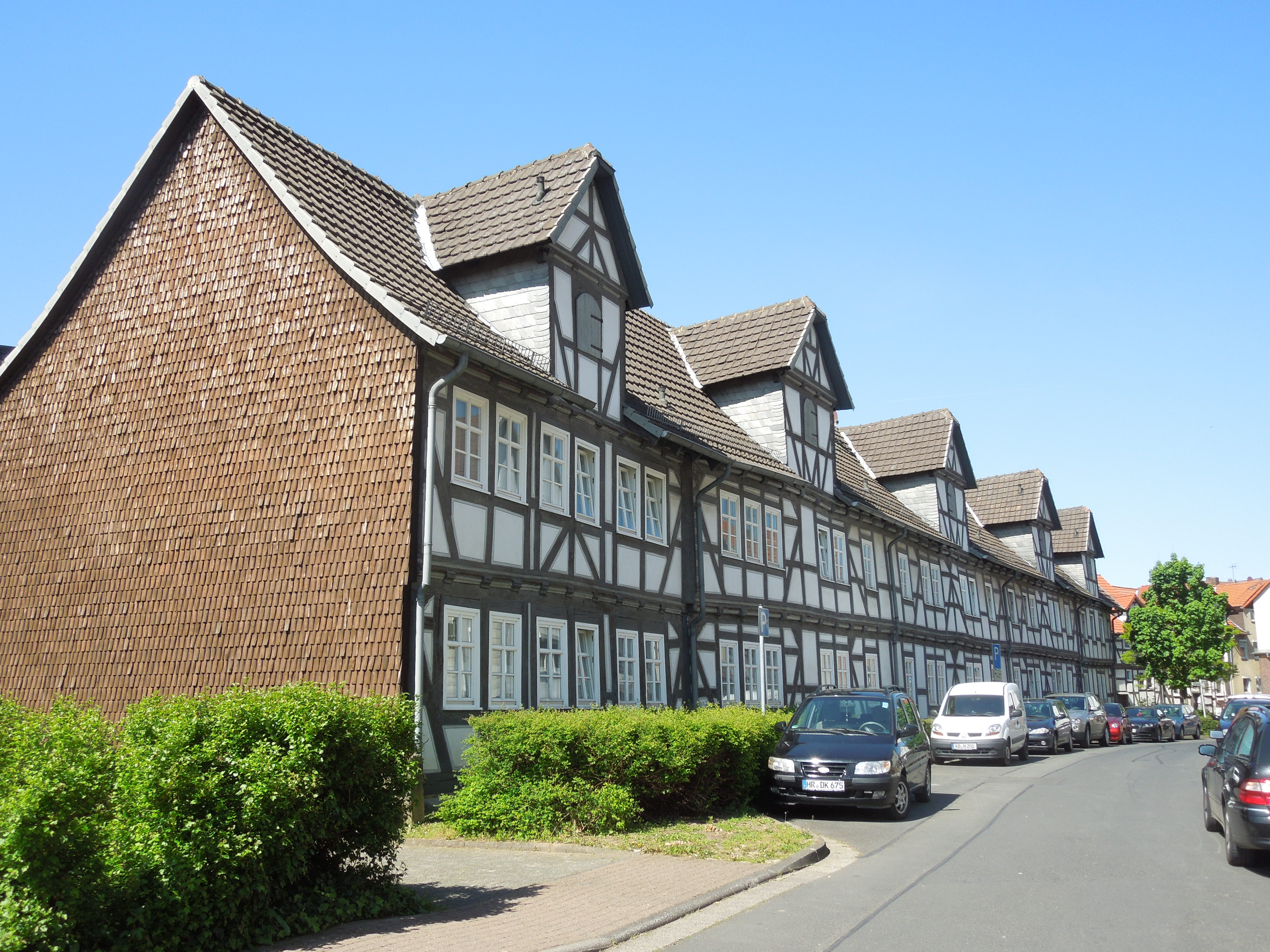 Das ehemalige Hospital zum Heiligen Geist in Gudensberg; 1365 für Aussätzige gegründet, jedoch bis ins 18. Jahrhundert mehrfach umgebaut